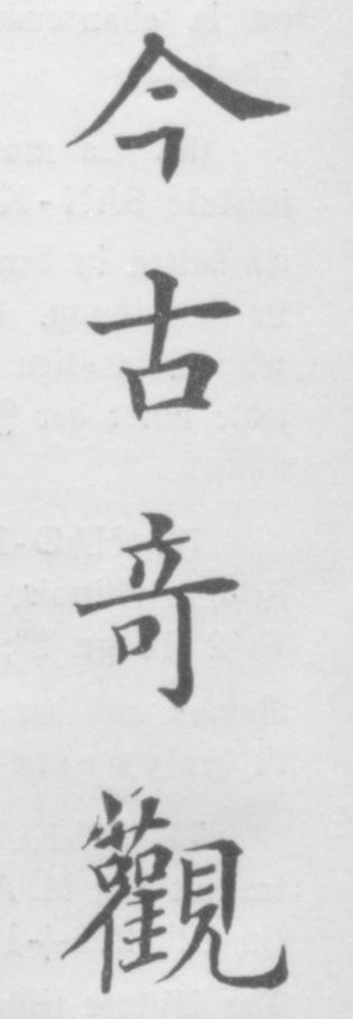 Chinesische Titelcharaktere des Jingu qiguan (von oben nach unten: jin gu qi guan).